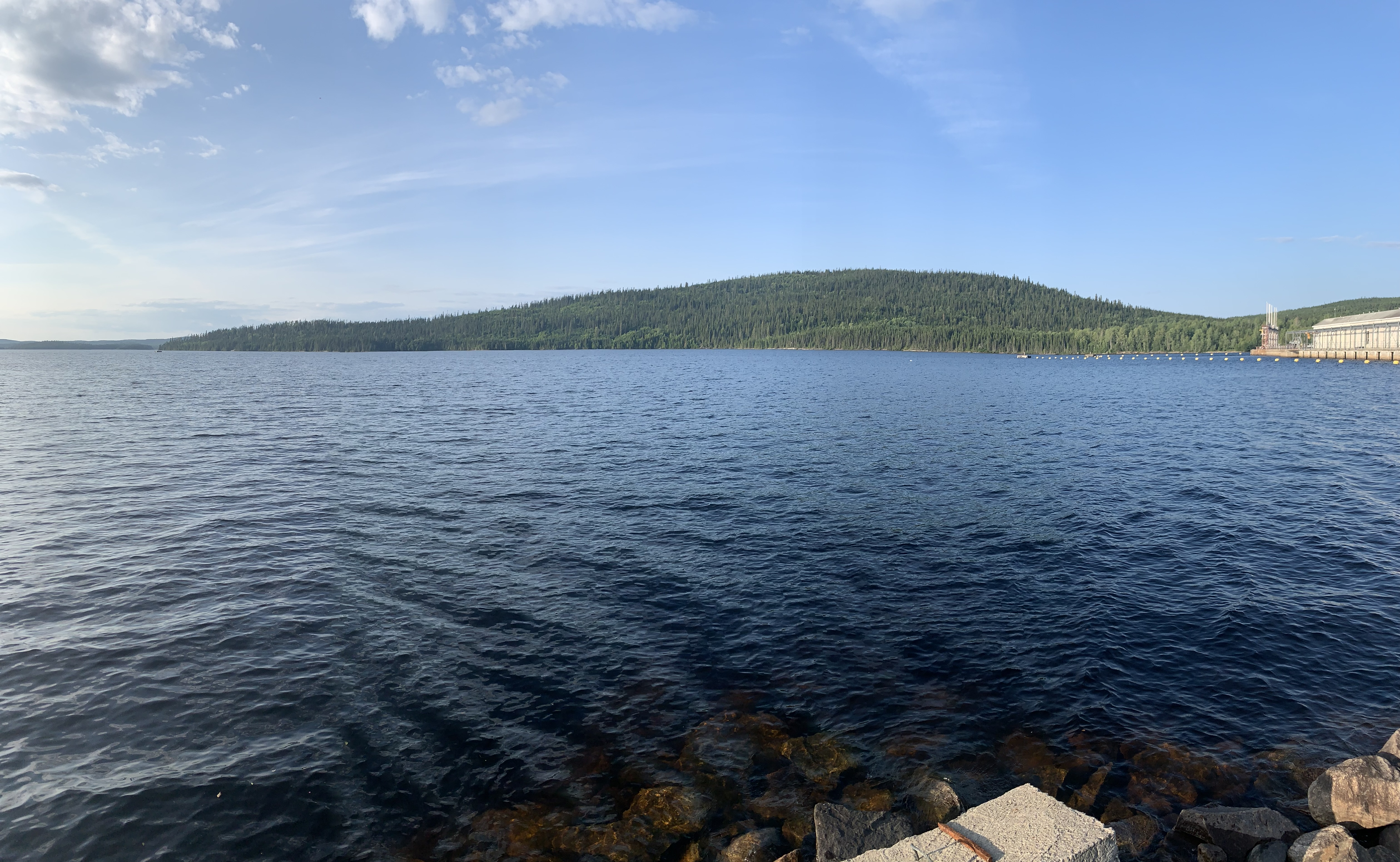 Expédition Tapiskwan sipi 2019